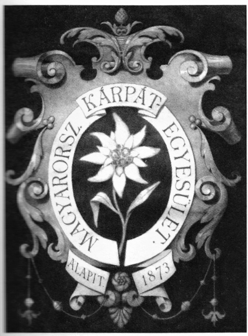 Odznak Uhorského karpatského spolku, ktorý bol založený v roku 1873 v Starom Smokovci, Slovakia.